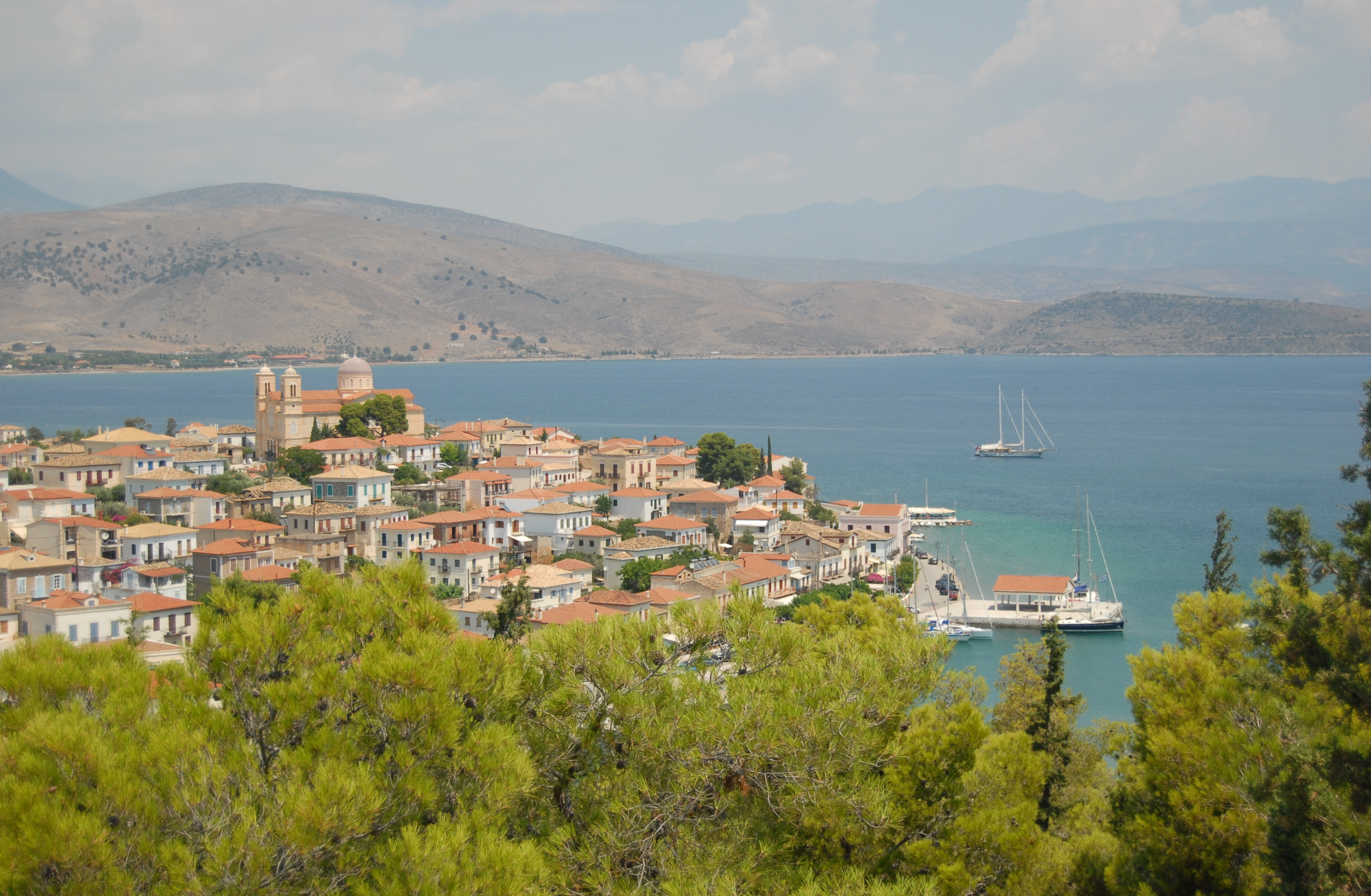 galaxidie